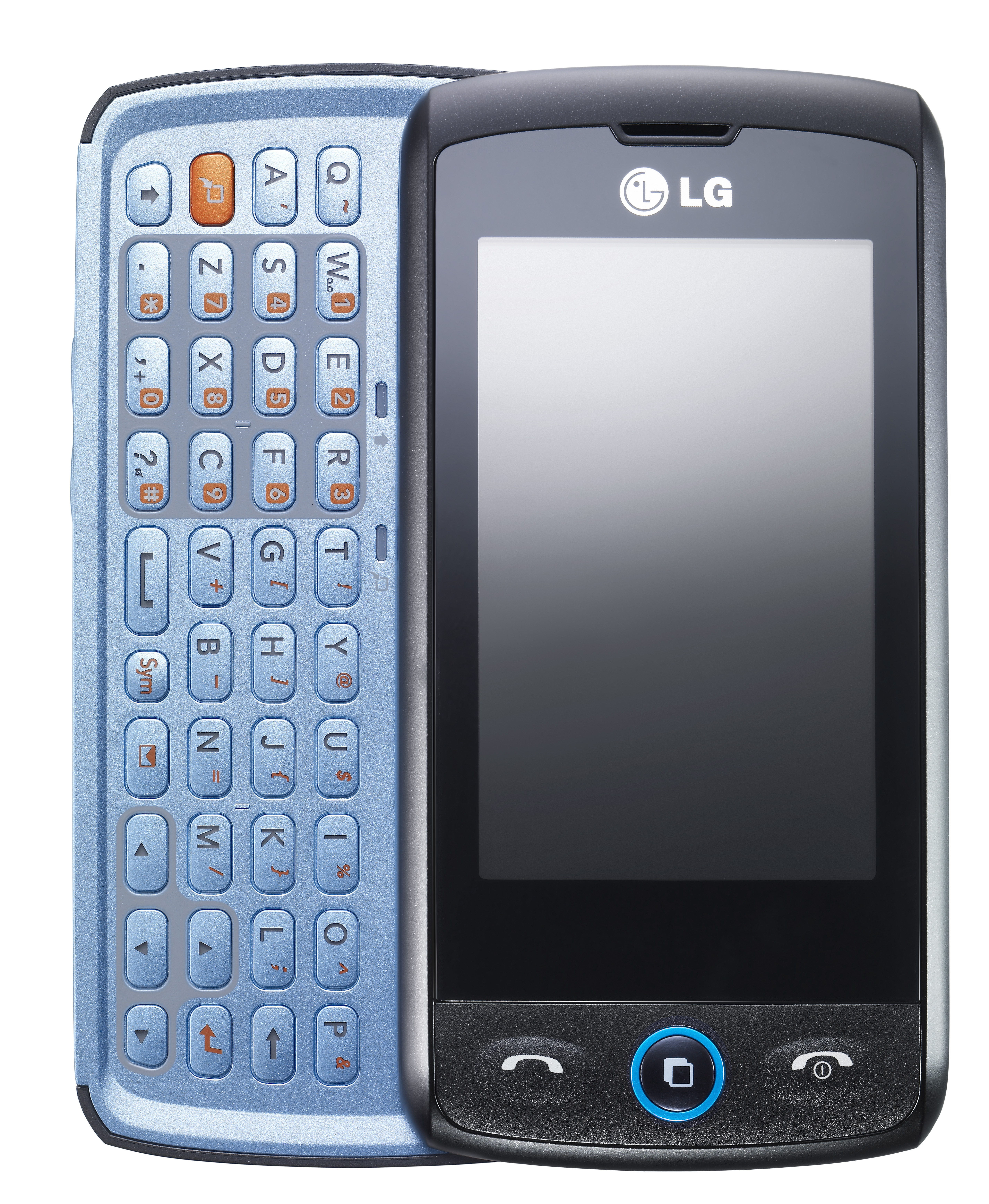 LG??, ?? ?S-Class UI? ??? 2?? ???? 4 ??? ??? ??? ?? ?? ? ?????? ???? ??????? 2009? (6/16~19) ?? ?????? ????? ????? ??? 30??? ??? ?? ?? ??S-??? UI???? ????, ????, ???, ?? ??? ? 2009? ?? ?? ?? ??? ? LG?? MC???? ??? ???, ????? ?? ???, ???, ???????? ? ?? S-??? UI? ??? ???? ??? ????? ??? ??? ??? ???? ???? ??? ??